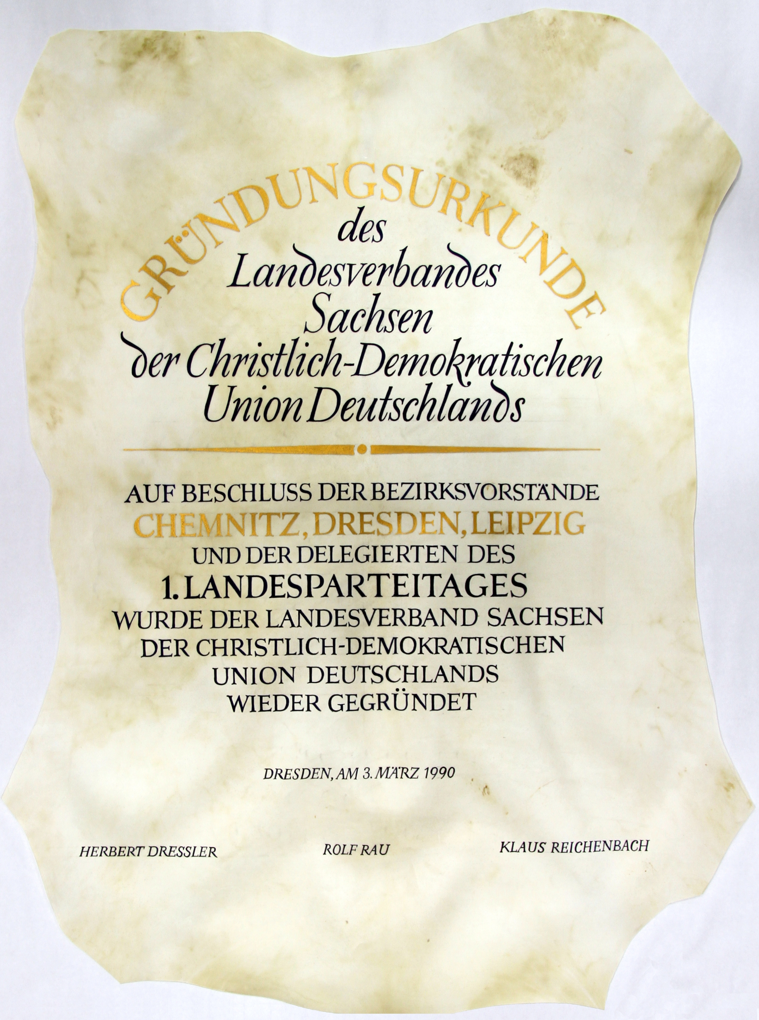 Gründungsurkunde des CDU-Landesverbandes Sachsen aus dem Jahre 1990, aufgenommen im Jahre 2014